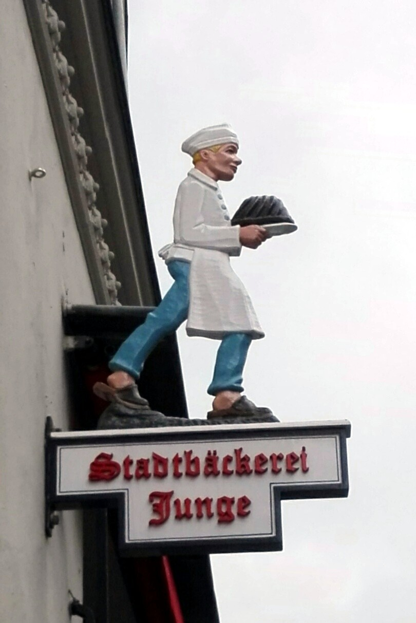 Nasenschild am Gebäude der Junge Konditorei an der Königstraße 43 in Lübeck.